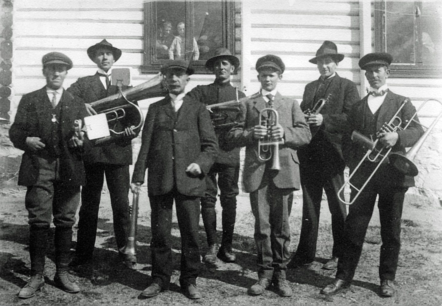 Musikere. 7 messingblåsere. Ljunggren foran.